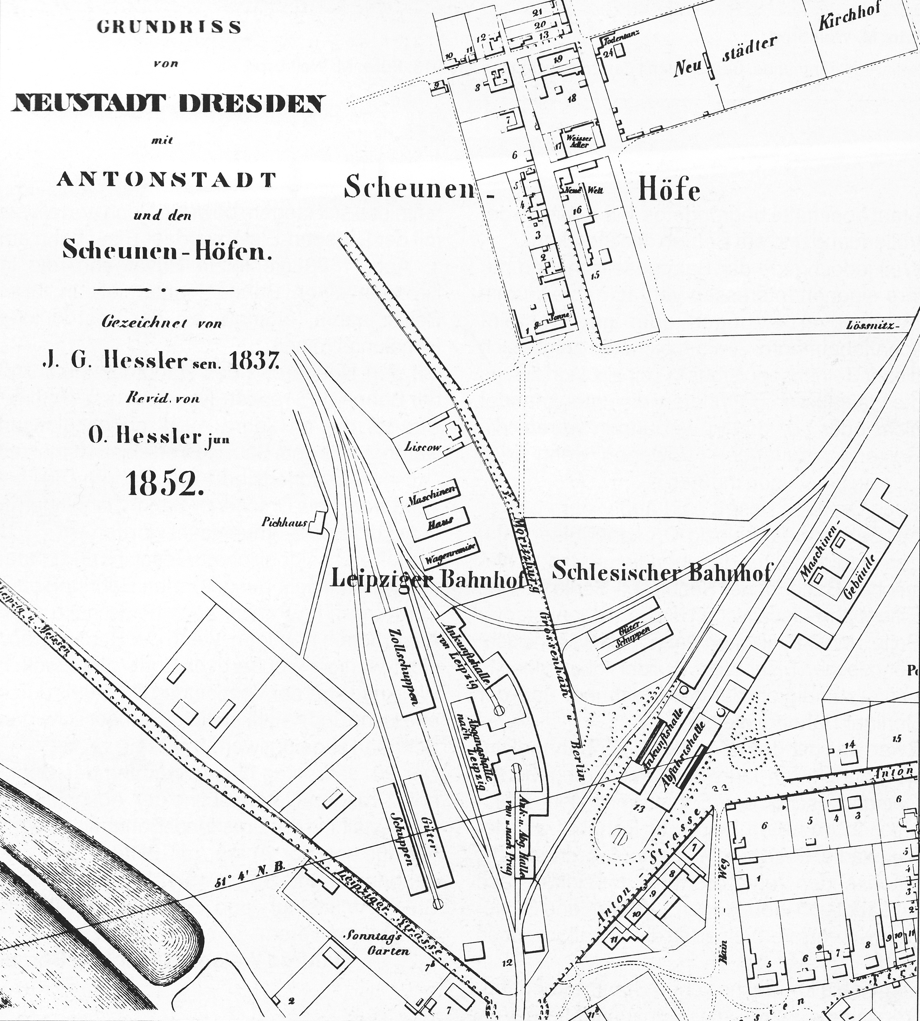 Lage des Leipziger Bahnhofs und des Schlesischen Bahnhofs in Dresden (1852)